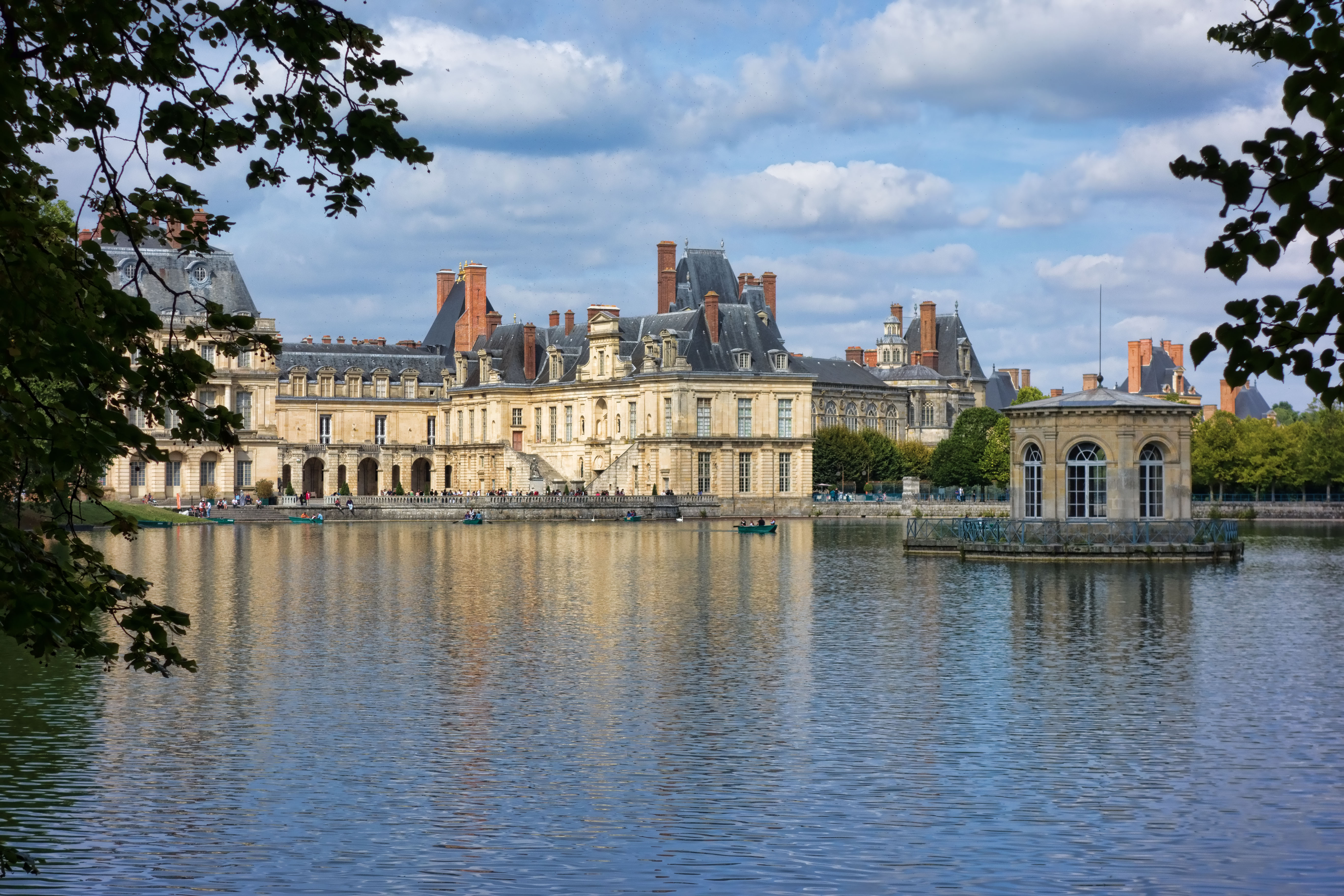 Fontainebleau - Château - Etang aux Carpes